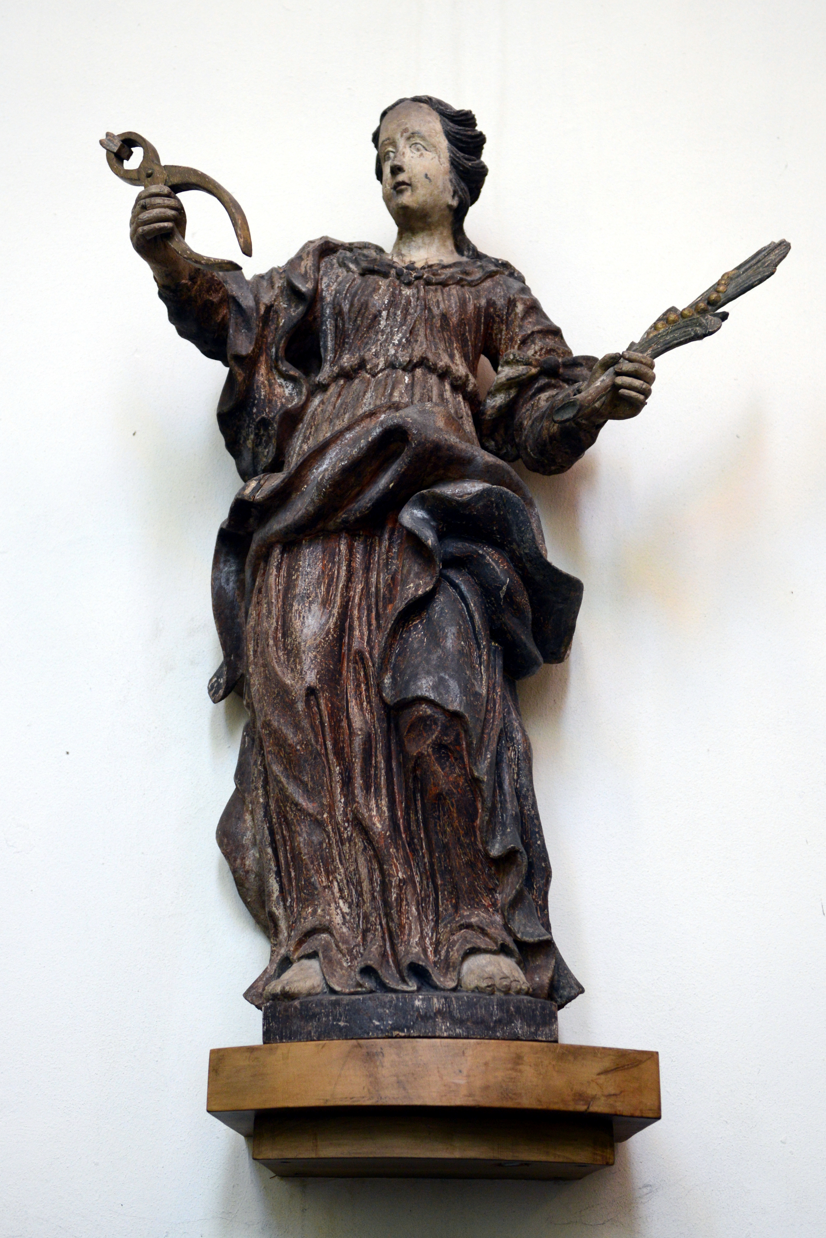 Apollonia vun Alexandria-Statu an der Beetebuerger Kierch, duergestallt mat hirem Attribut, enger Zänndokteschzaang.